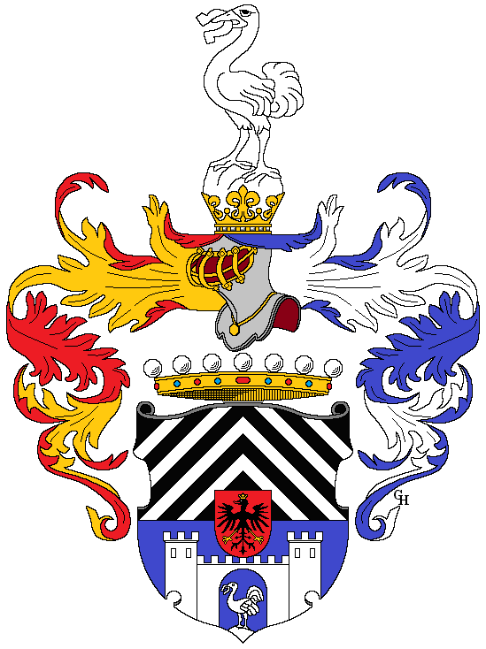 Wappen des k.u.k. Generalobersten Arthur Arz von Straußenburg (1857–1935), verliehen 1918 nach seiner Erhebung in den Freiherrenstand als Ritter des Militär-Maria-Theresien-Ordens 1917. Zeichnung von Gerd Hruška ( Für weitere Informationen zu dieser Standeserhebung siehe (